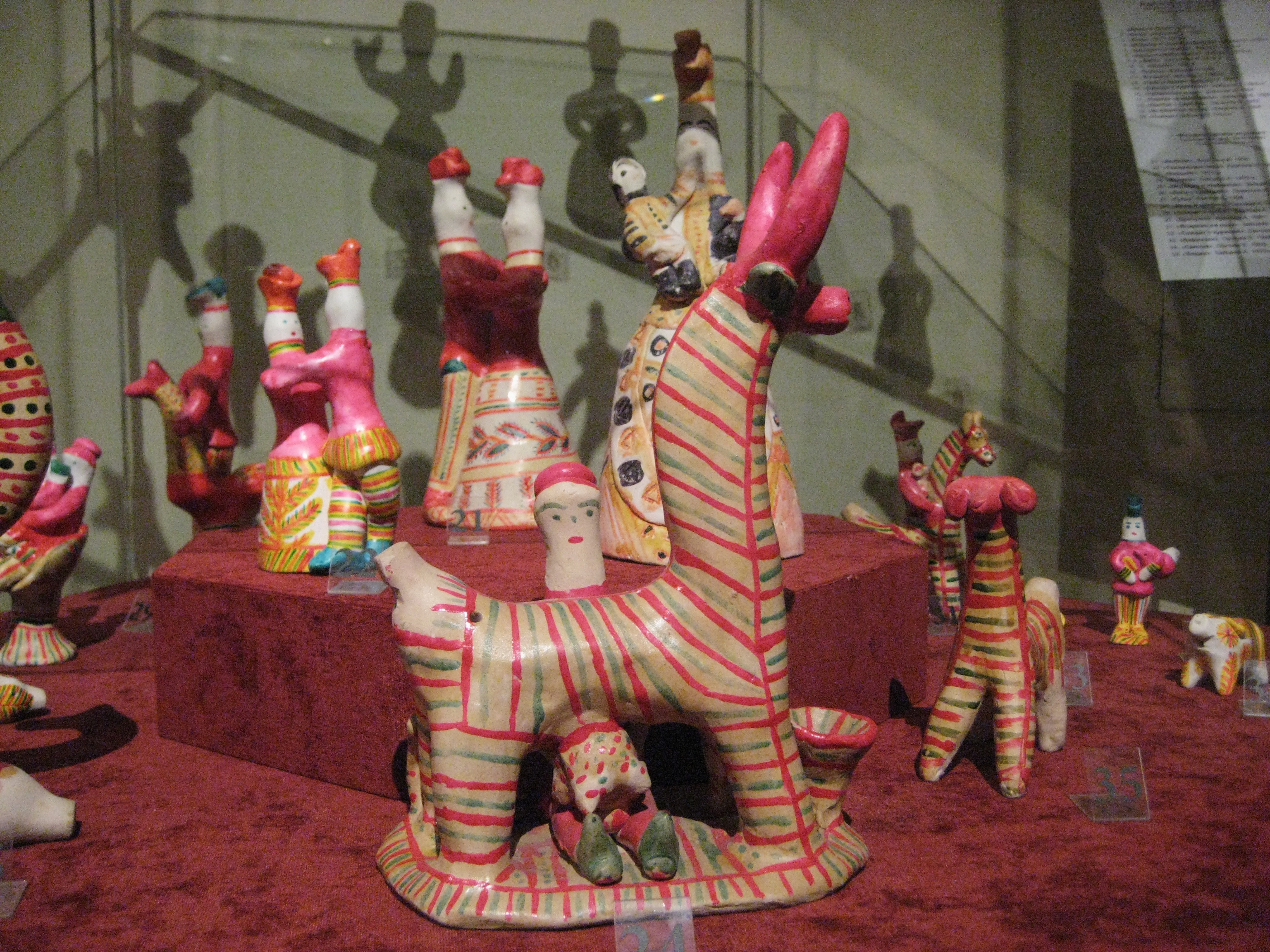 Игрушки